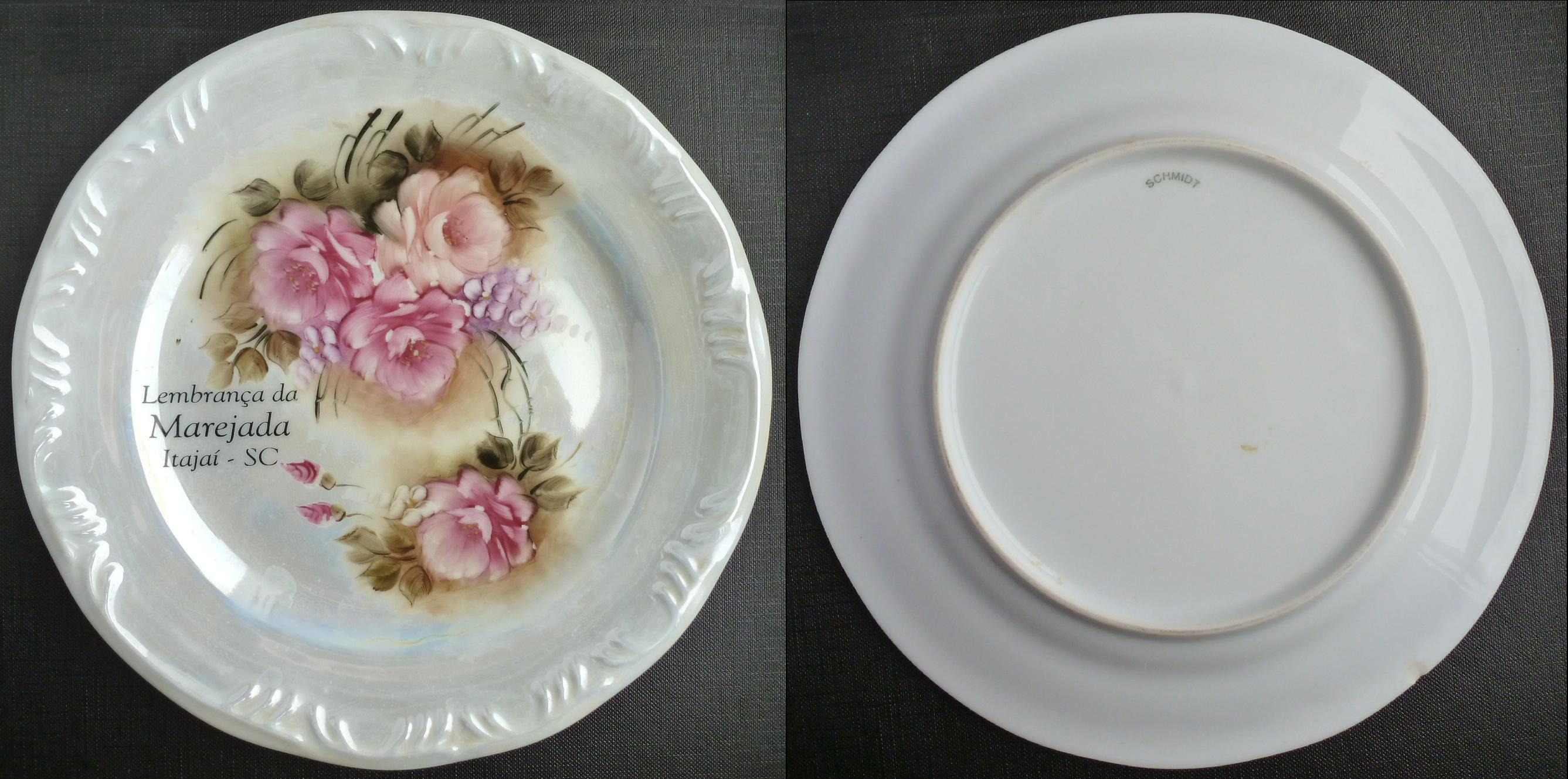 Сувенирная тарелка с Марежады. Сделана на фабрика Schmidt. Итажаи, Бразилия. Unknown